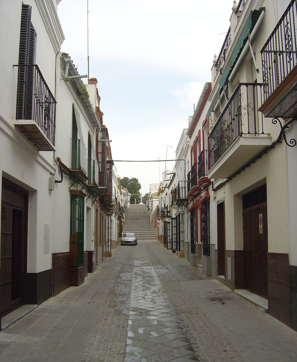 Coria del Rio